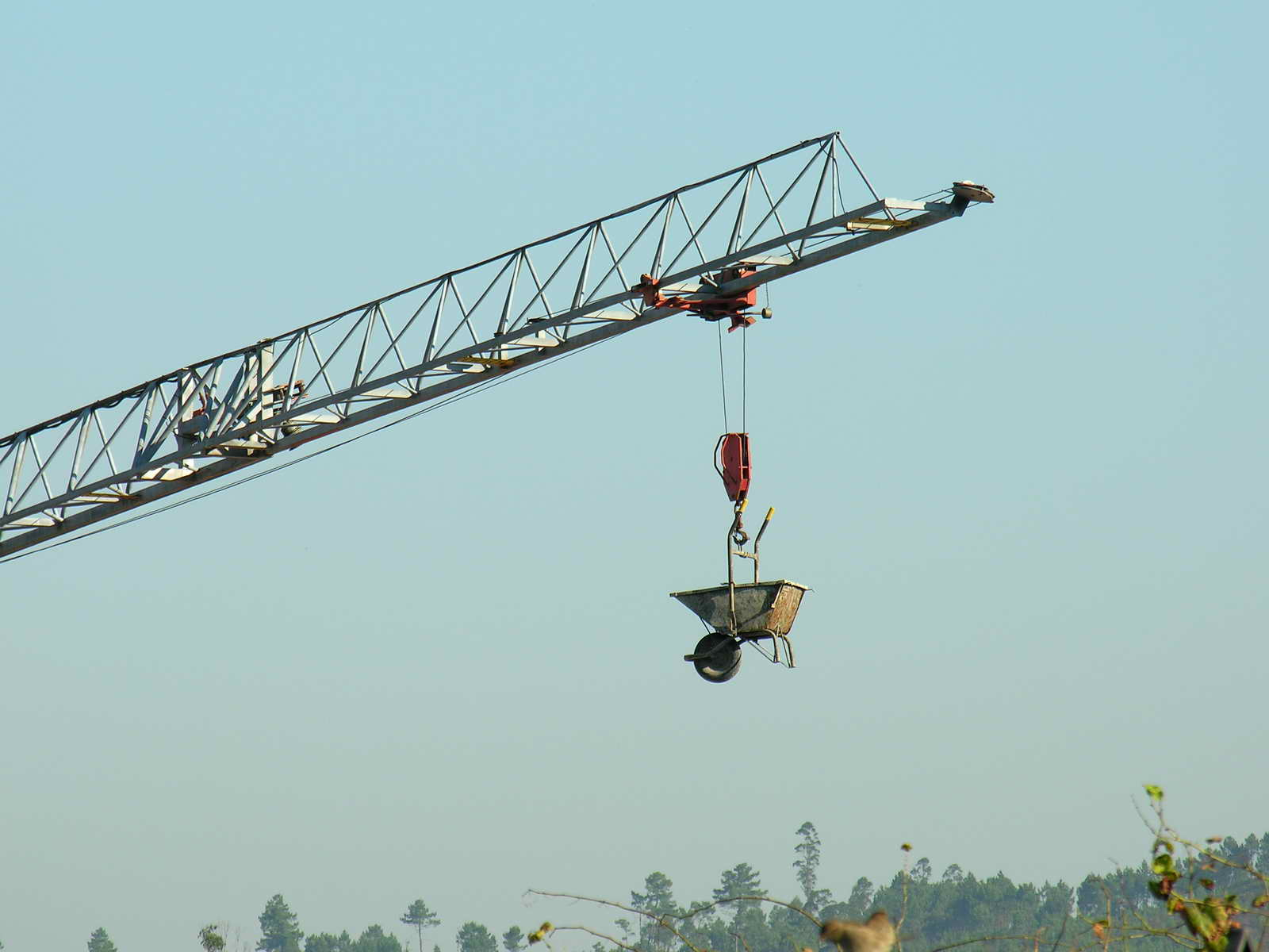 self made